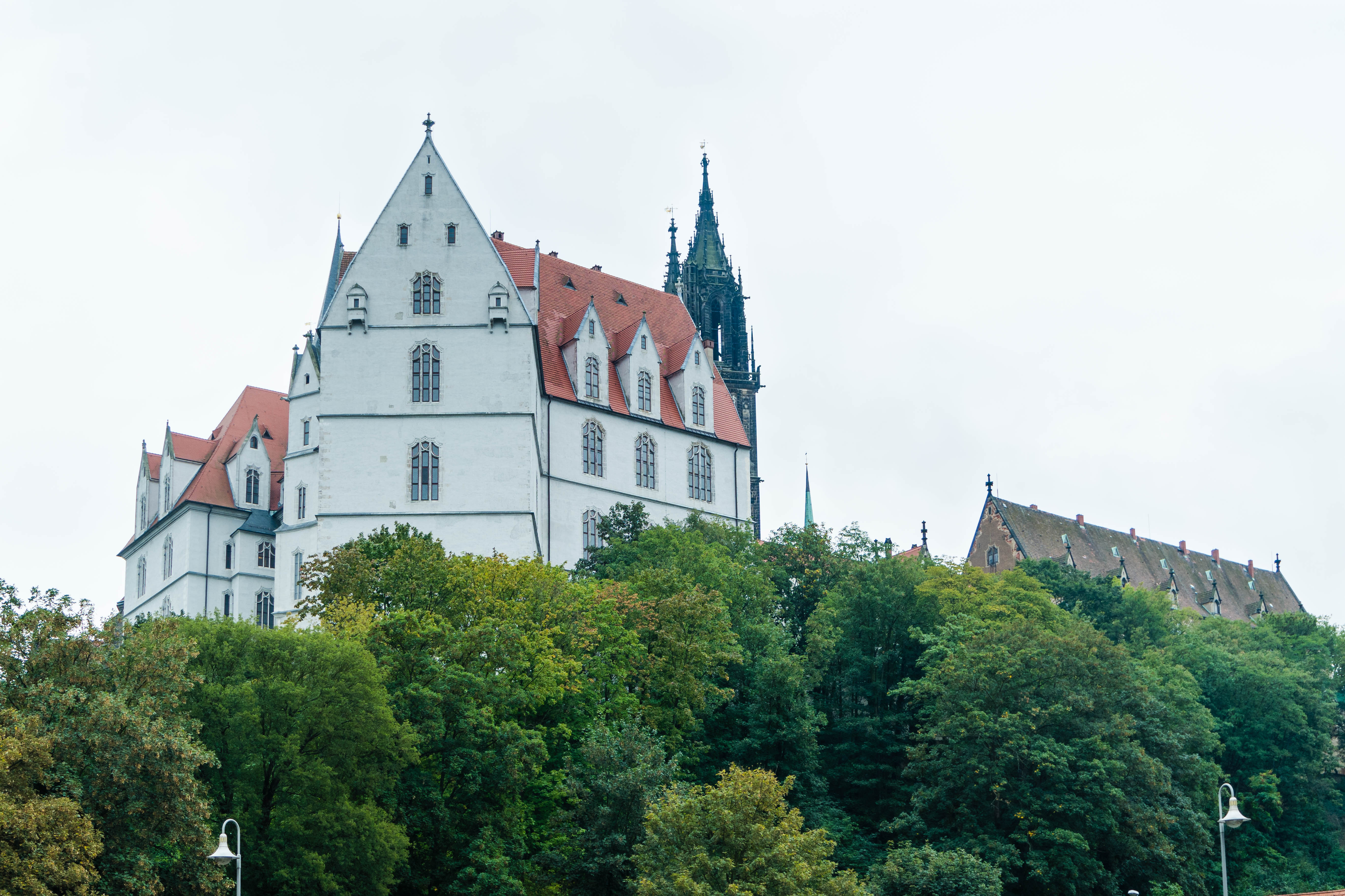 Albrechtsburg Meißen, Nordseite auf dem Burgberg Domplatz 1 in Meißen